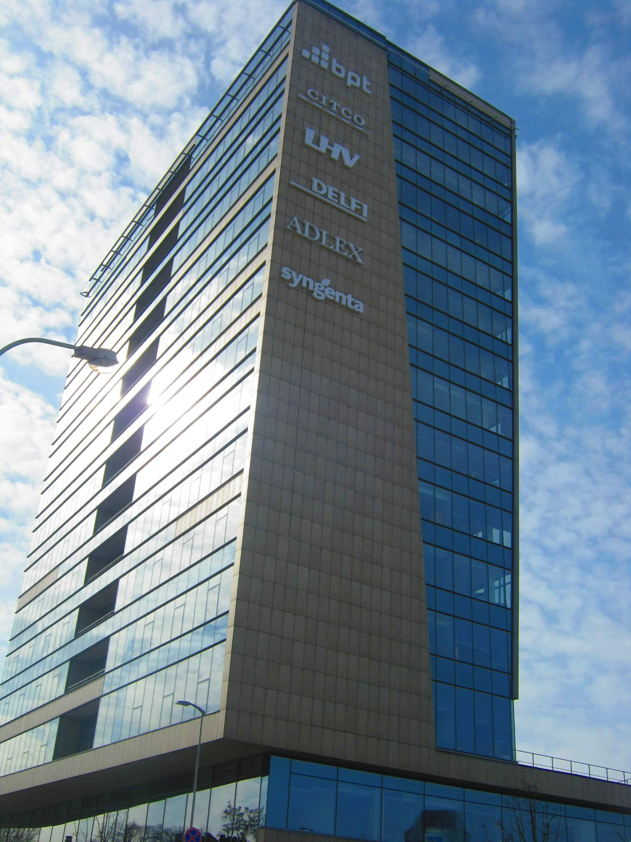 Vilnius